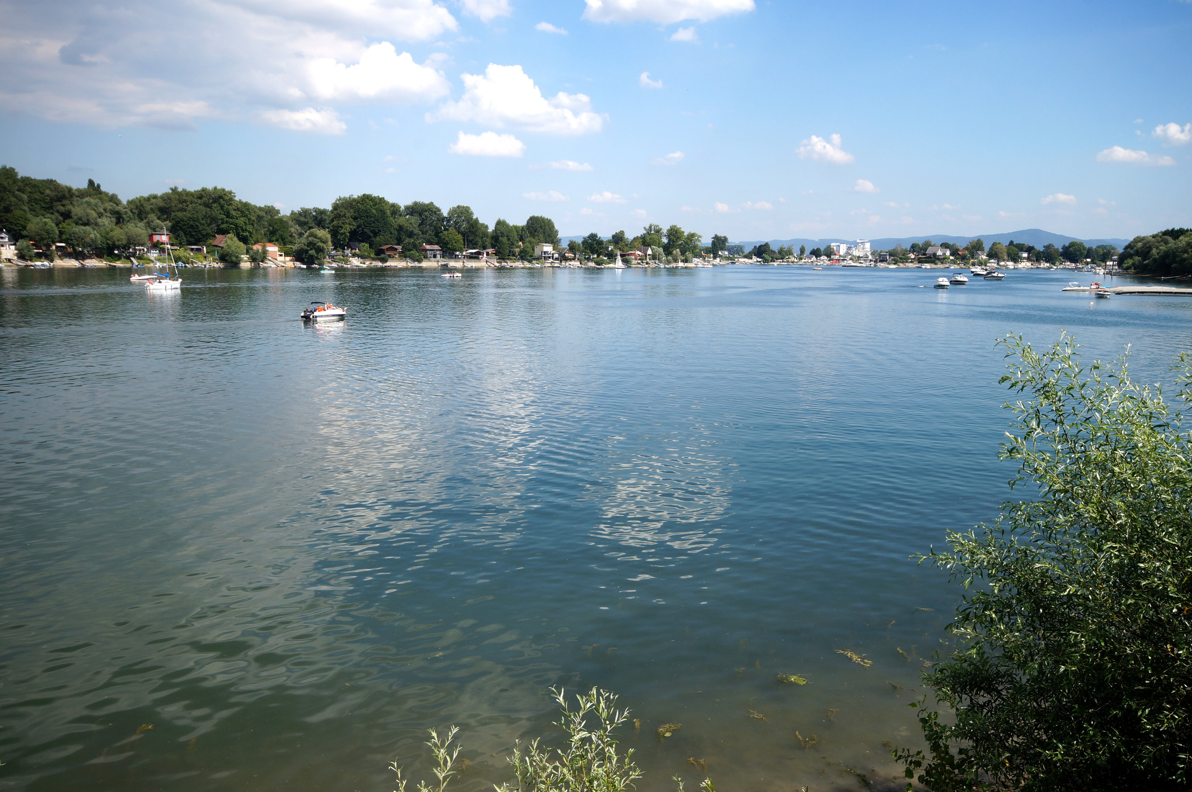 Der Eicher See bei Eich in Rheinhessen